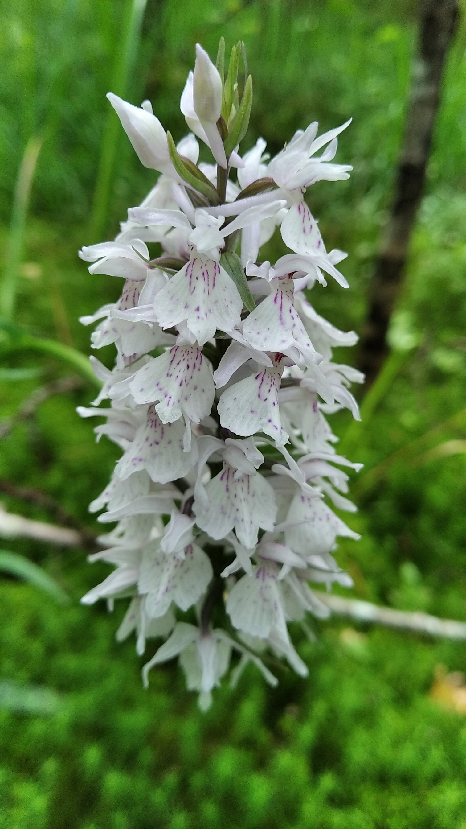 Пальчатокоре́нник балти́йский (Мшинское болото)